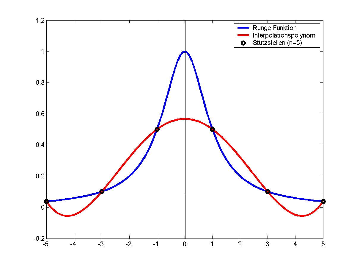 Interpolation der Rungefunktion bei 5 äquidistanten Stützstellen